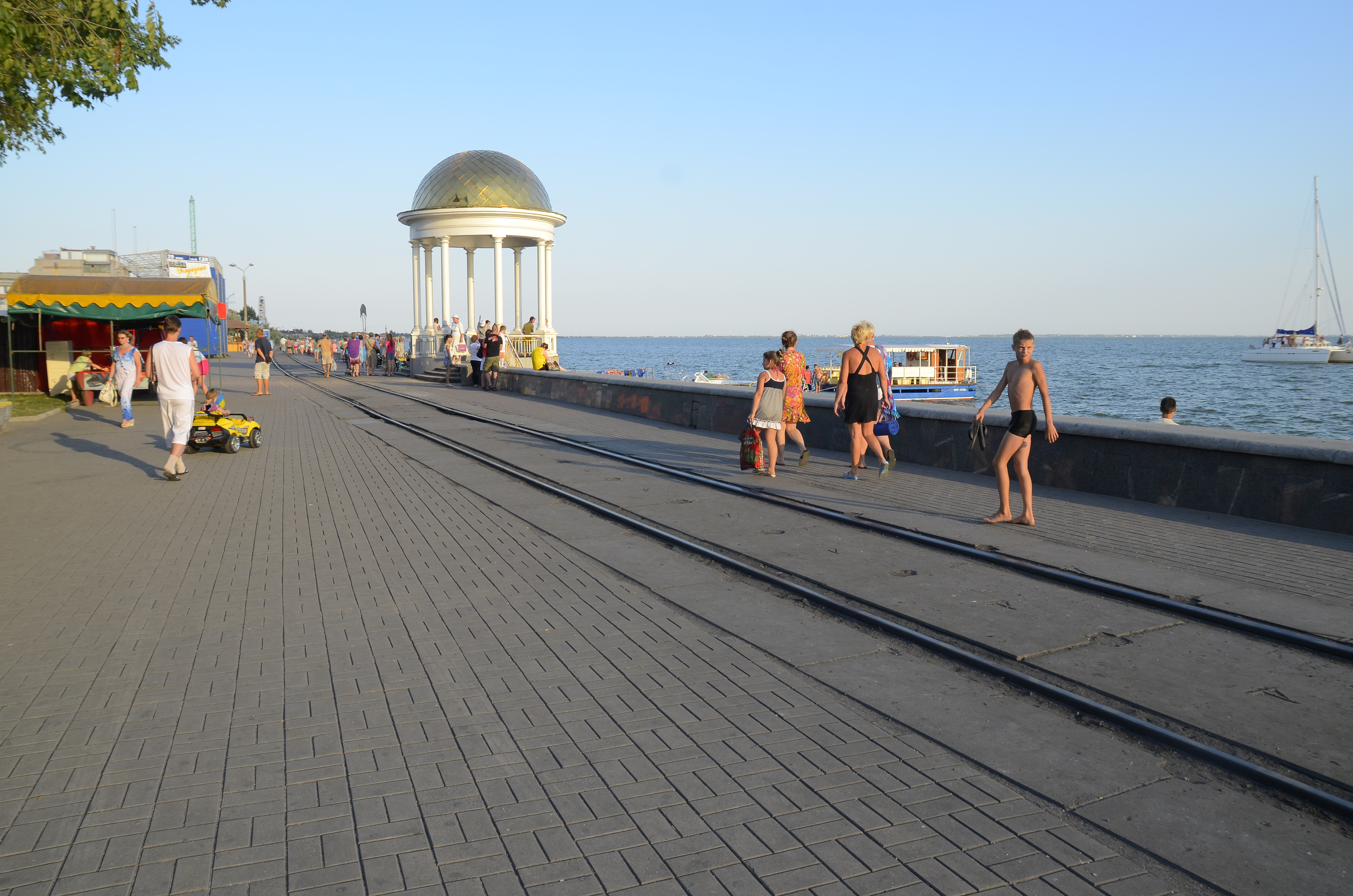 Бердянск